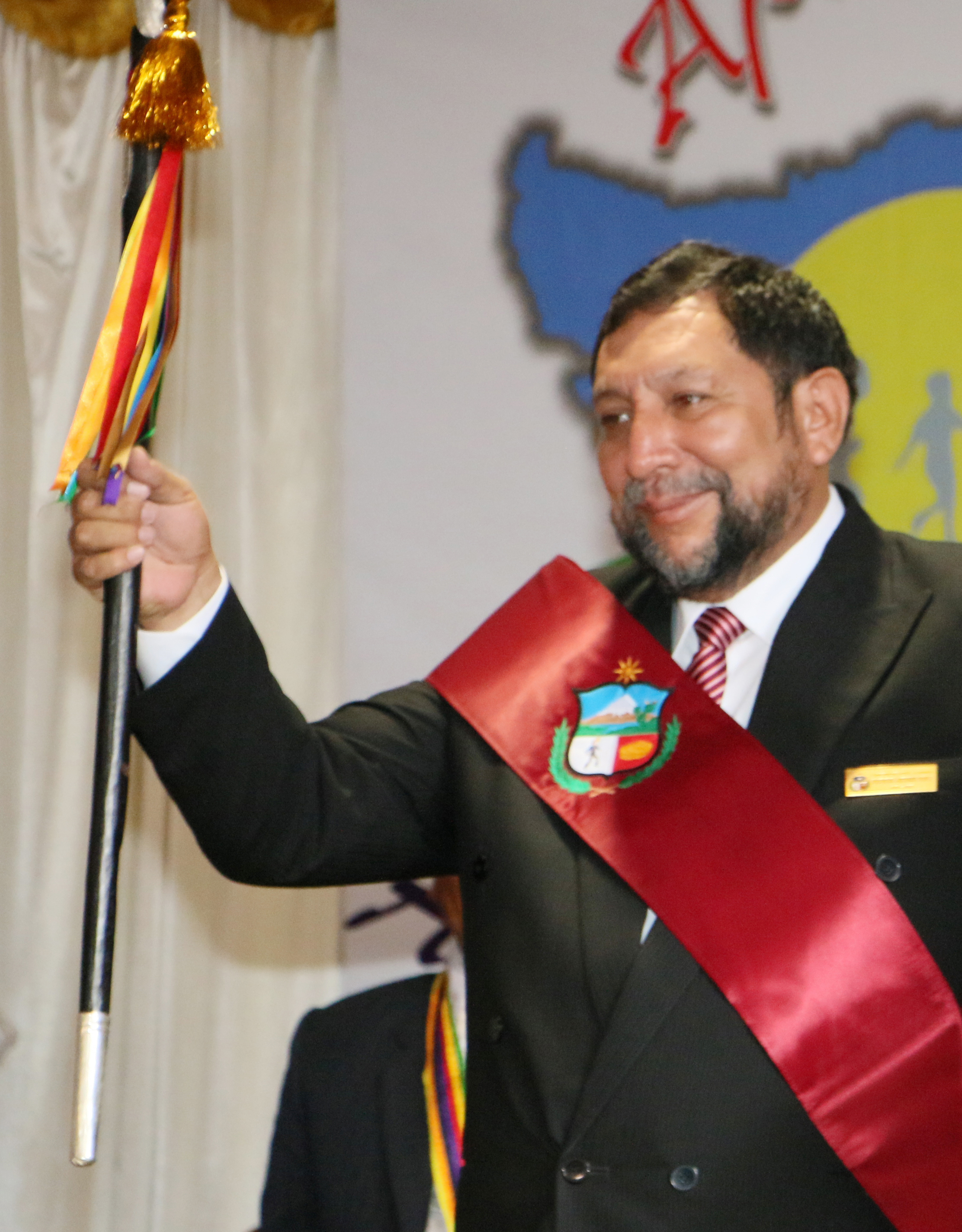 Baltazar Lantarón Núñez - Gobernador Regional de Apurímac